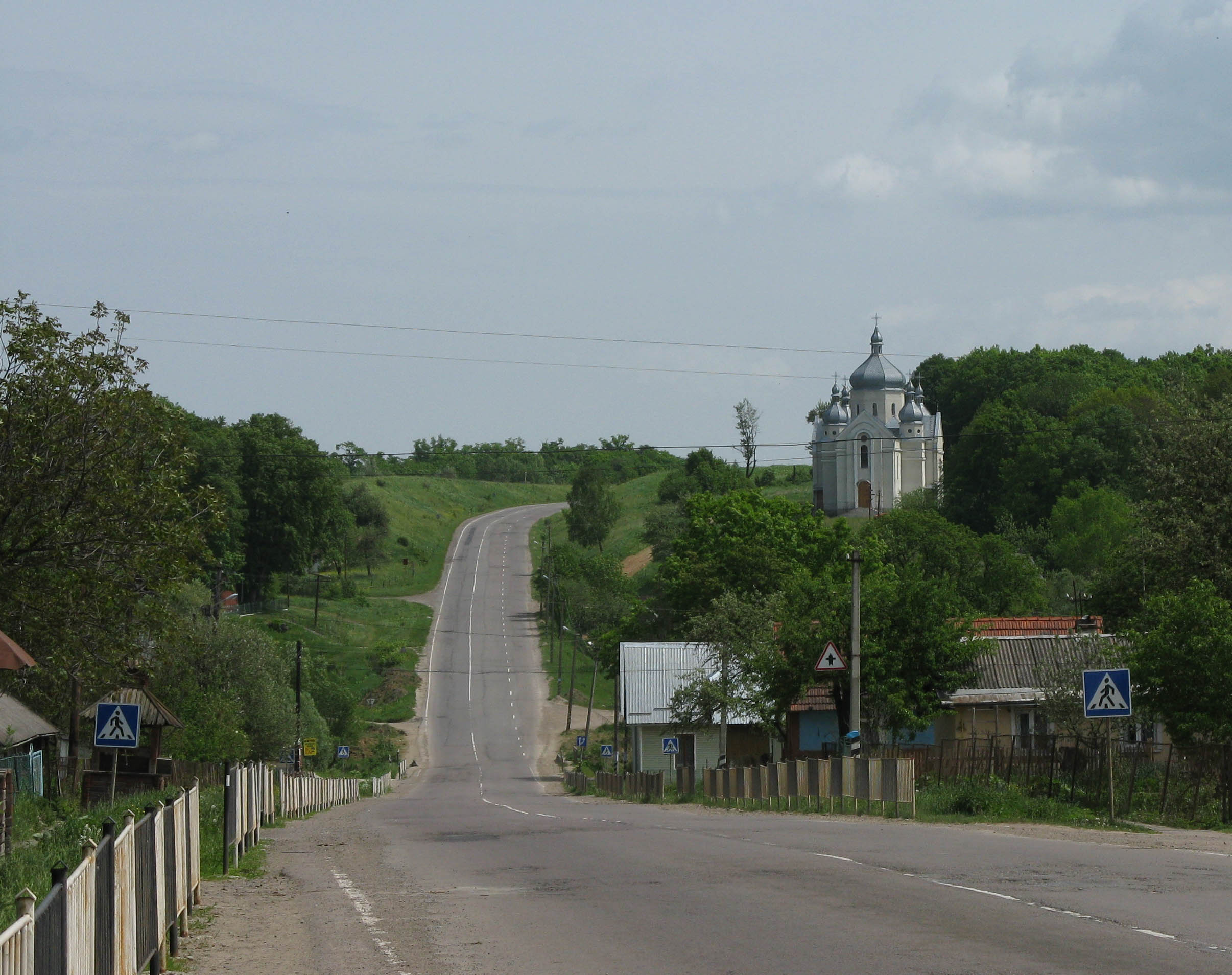 Село Солонське